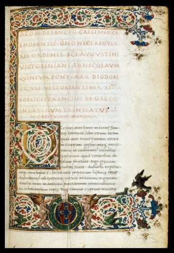 British Library, Harley 4916. Incipit della traduzione di Iacopo da San Cassiano dell'XI libro dlela Bibliotheca Historica di Diodoro Siculo.